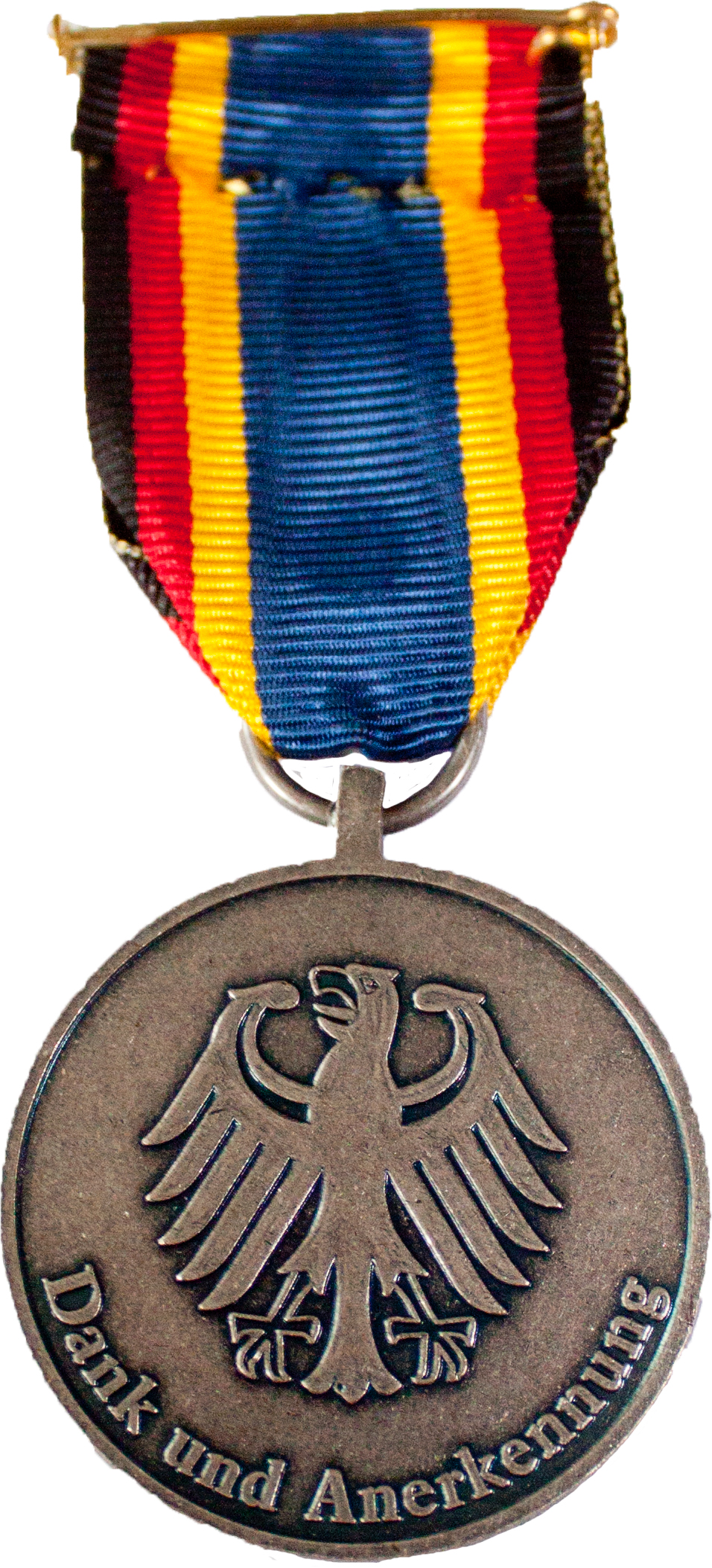 Einsatzmedallie Fluthilfe 2013 Rückseite